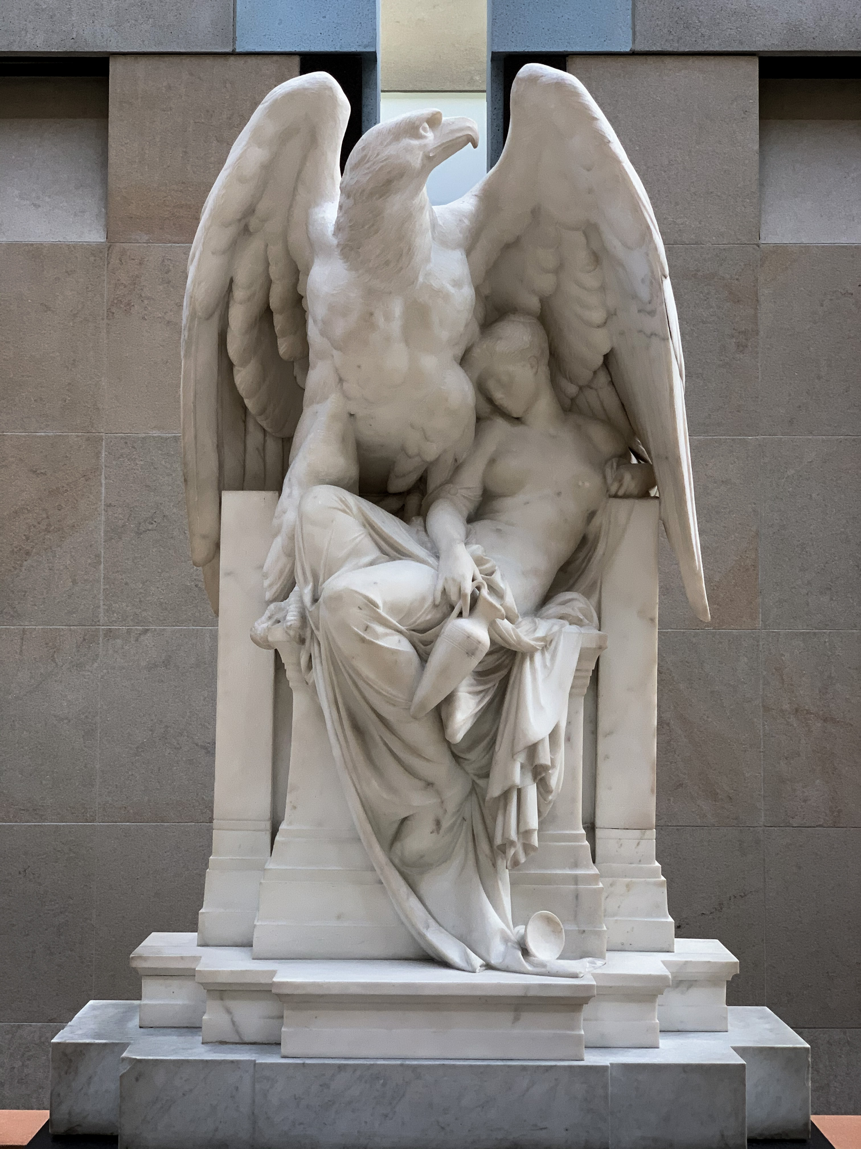 Hébé endormie, marbre de Carrier-Belleuse exposé au Salon de 1869. Il est conservé au musée d'Orsay.